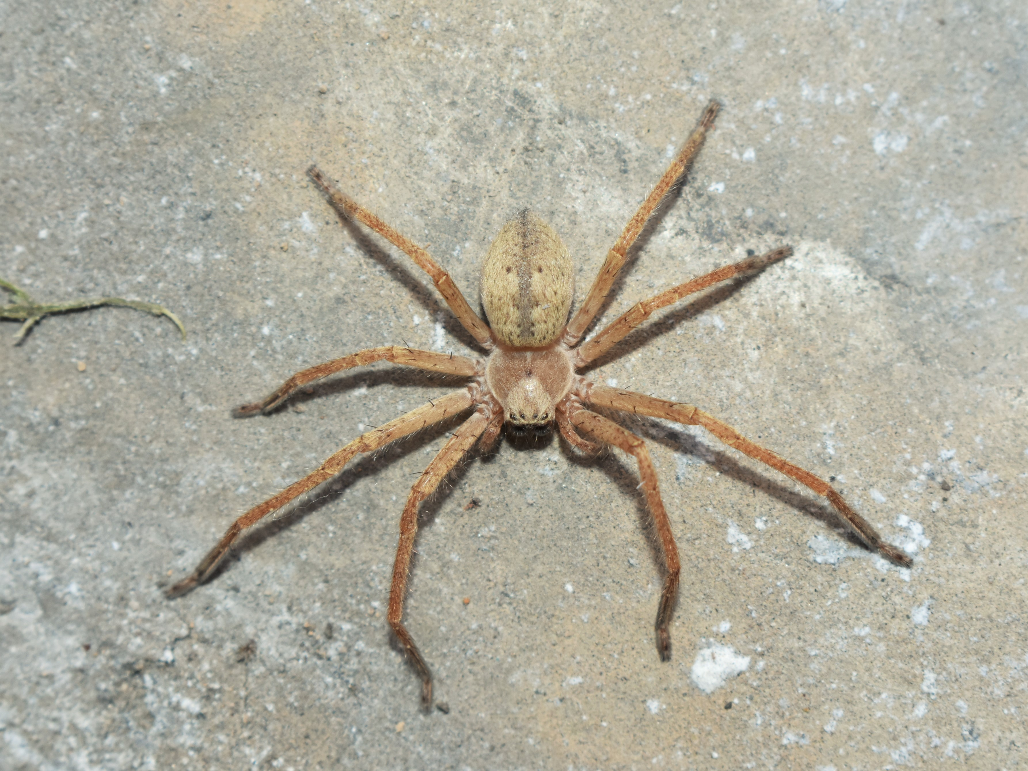 Olios sericeus